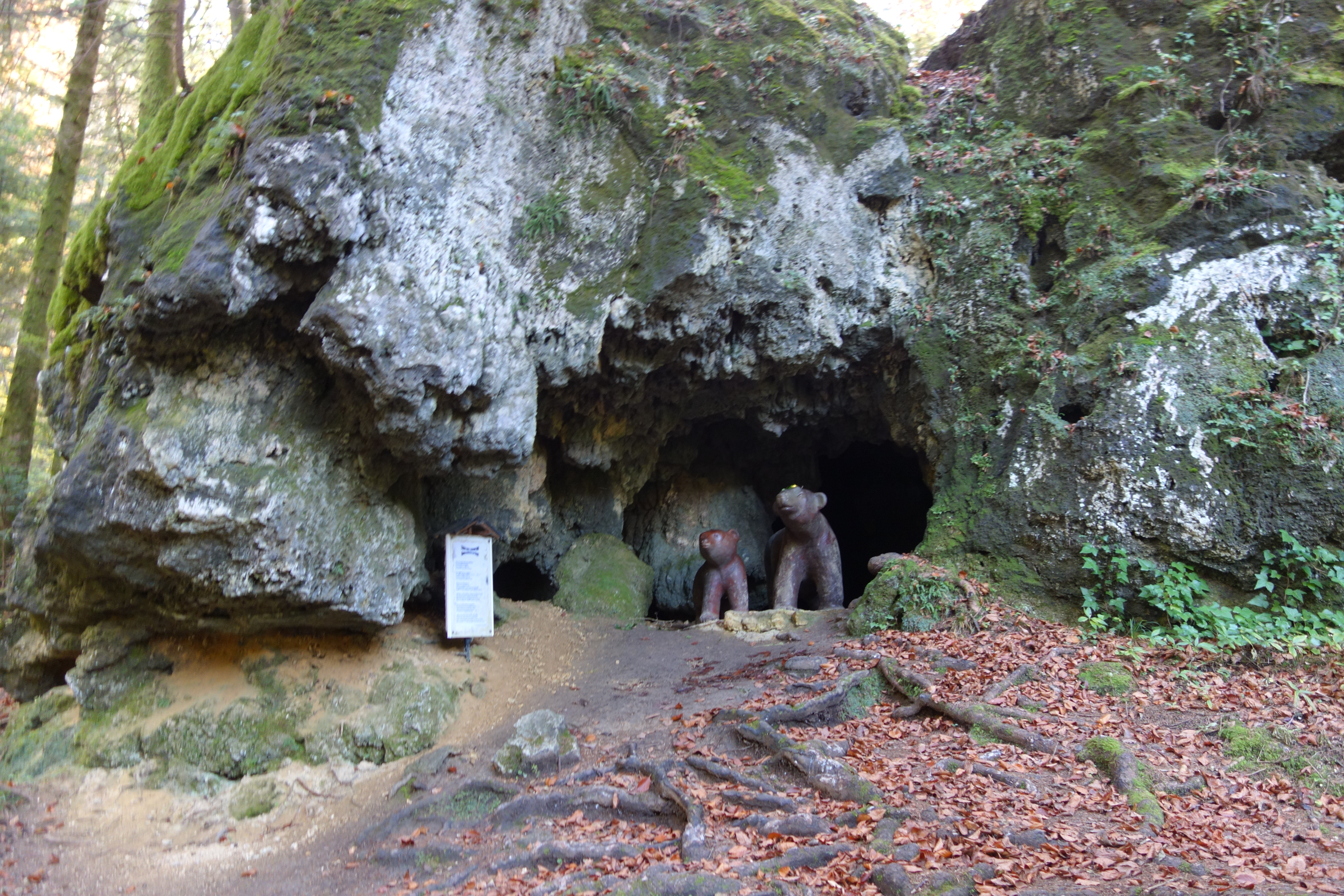 Les Nans (Jura) - Grotte aux ours à la source de l'Angillon